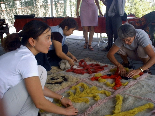 Alakiyiz making